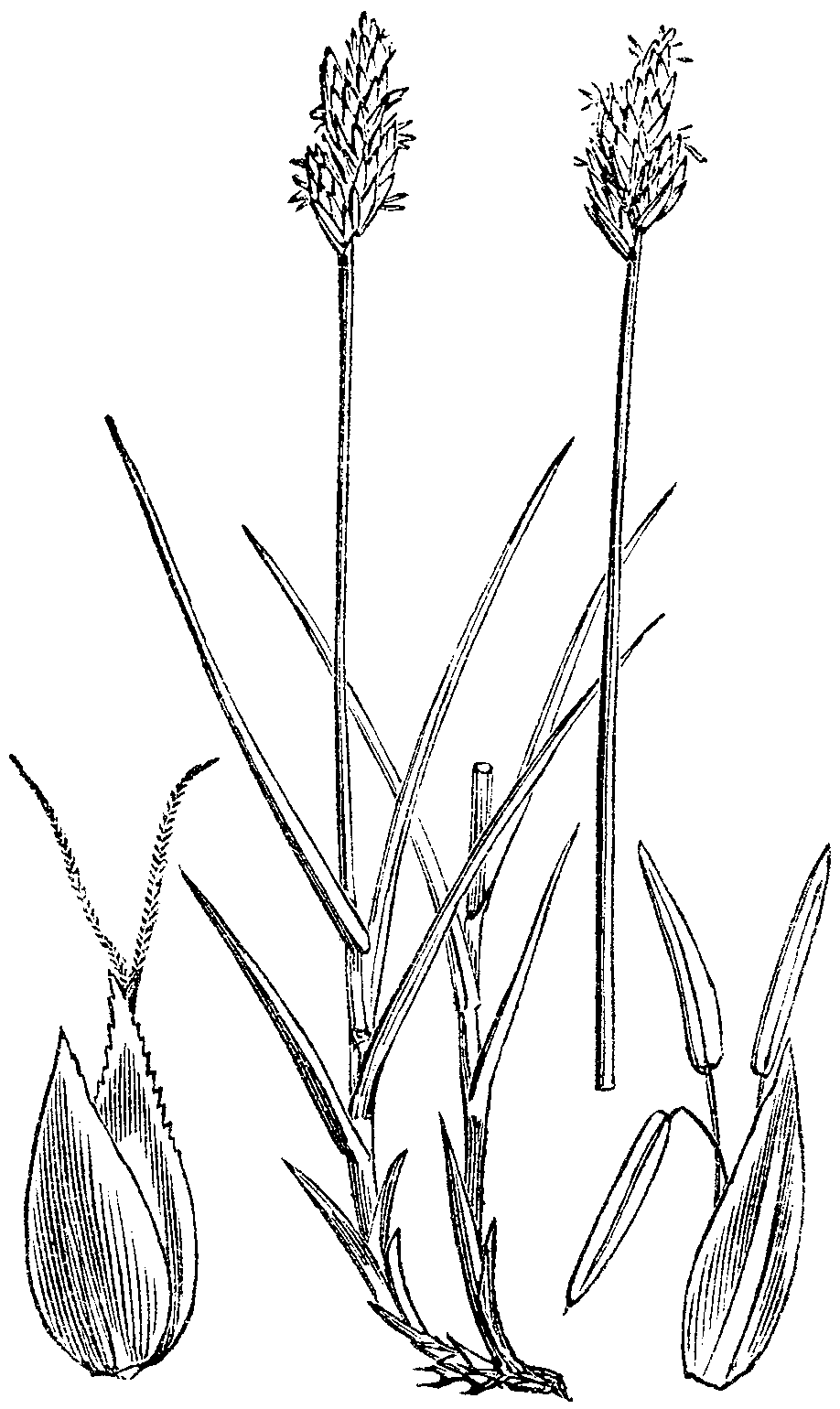 Slika 474. Nogasti šaš. (Cárex leporína.) [sic!]